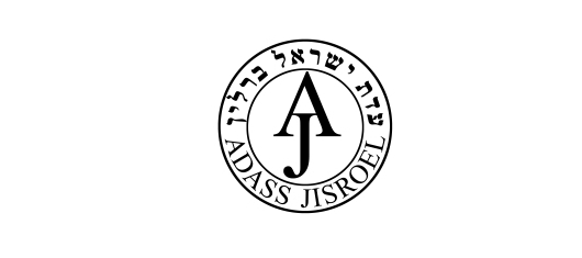 Offizielles Logo der Gemeinde